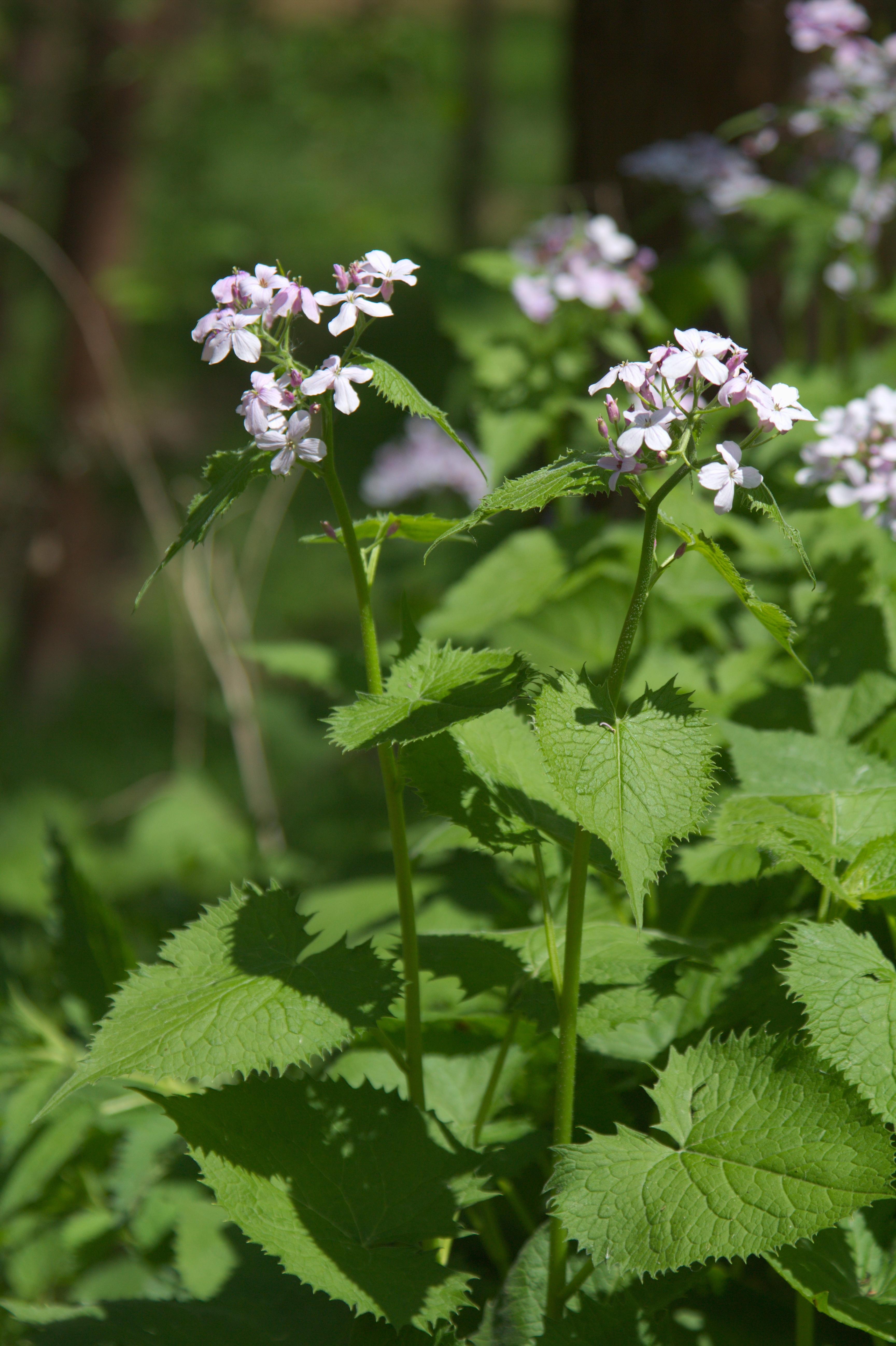 Ostrolovský újezd (přírodní památka) - Lunaria rediviva L., měsíčnice vytrvalá - C4a (vzácnější taxony vyžadující pozornost)